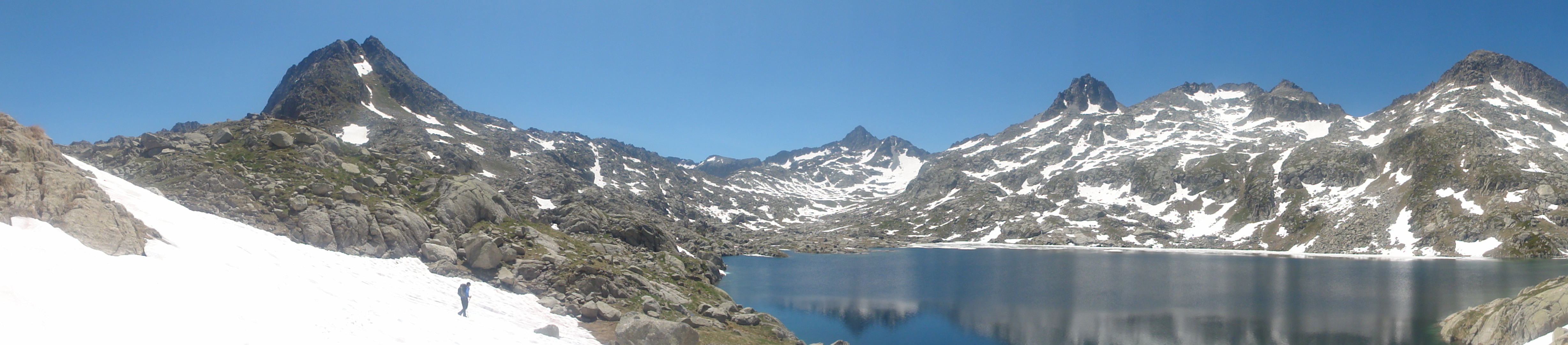 Aigüestortes This is a a photo of a natural area in Catalonia, Spain, with id: ES510081